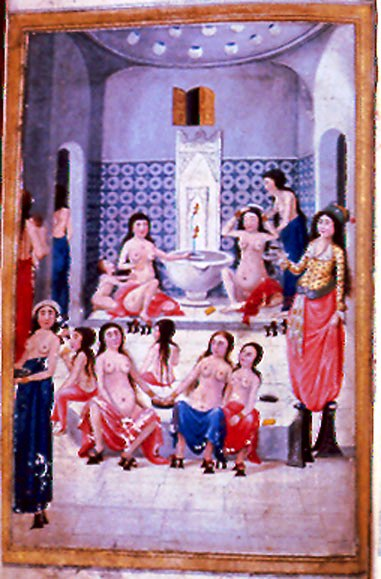 Frauen im Bad mit Gebärender